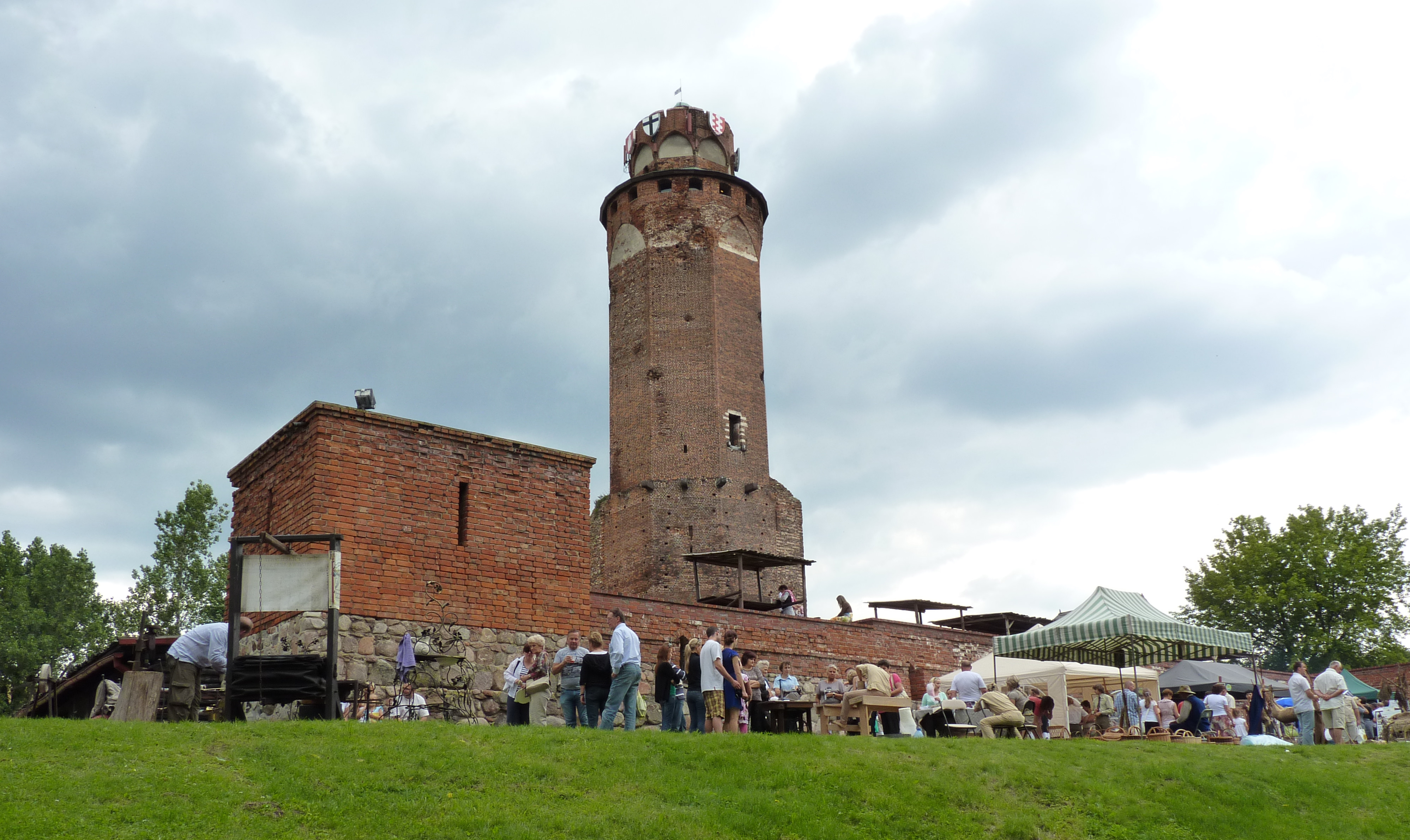 Brodnica - wieża dawnego zamku